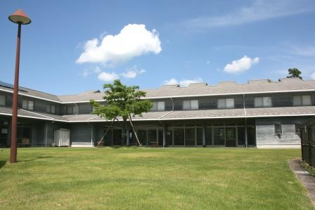 わくわく体験館宿泊施設（２階）